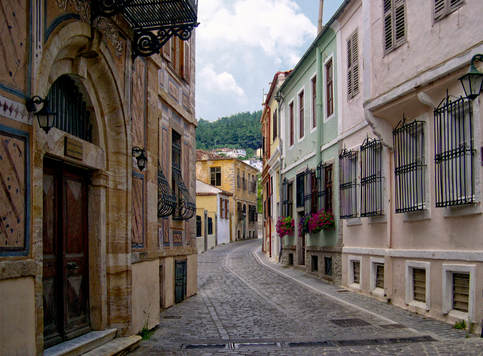 το Αρχοντικό Κουγιουμτζόγλου, στα σοκάκια της παλιάς πόλης της Ξάνθης